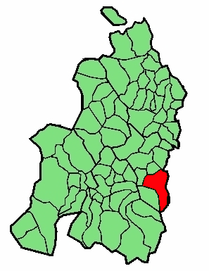 aipaturiko udalerriaren kokapena Nafarroa Beherean